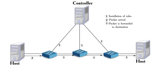 Монгол: Proactvie